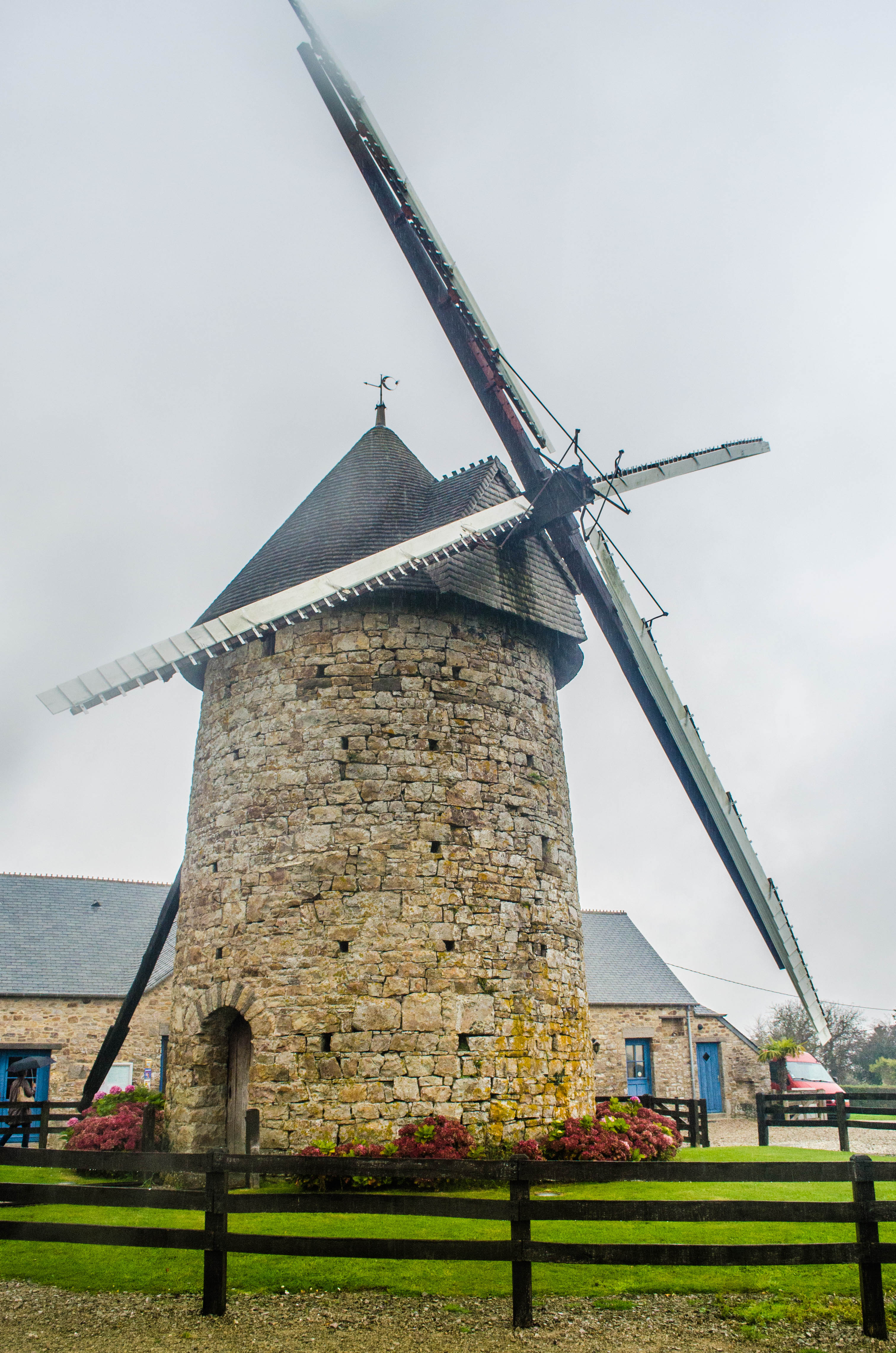 Fierville-les-Mines, Manche, France. Moulin du Cotentin, 1744, restauré en 1997. Ailes Berton